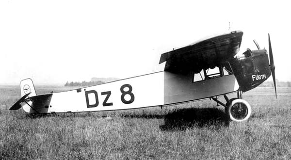 fokker f.3